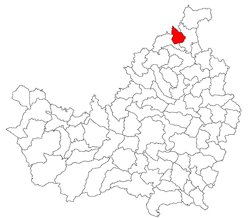 Categorie:Hărţi ale judeţului Cluj